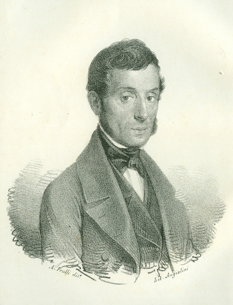 Ritratto di Filippo Mordani.